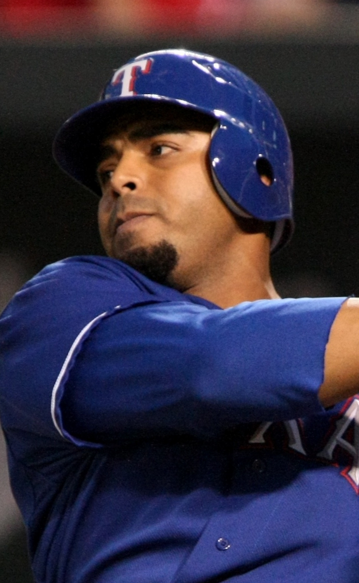 Nelson Cruz